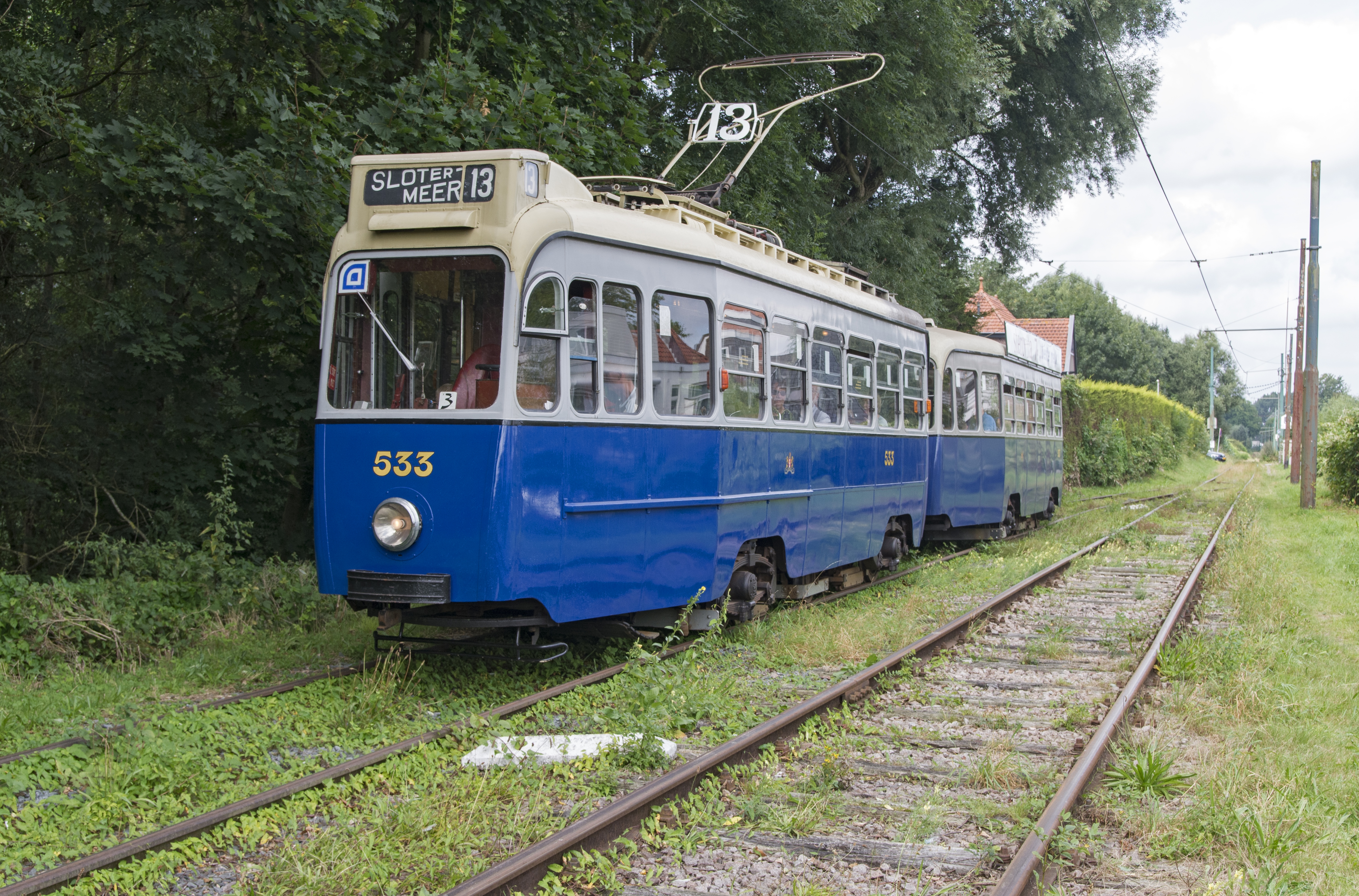 Amsterdam Museum Tram 533 is op de eigen elektrische tramlijn naar Amstelveen en Bovenkerk.